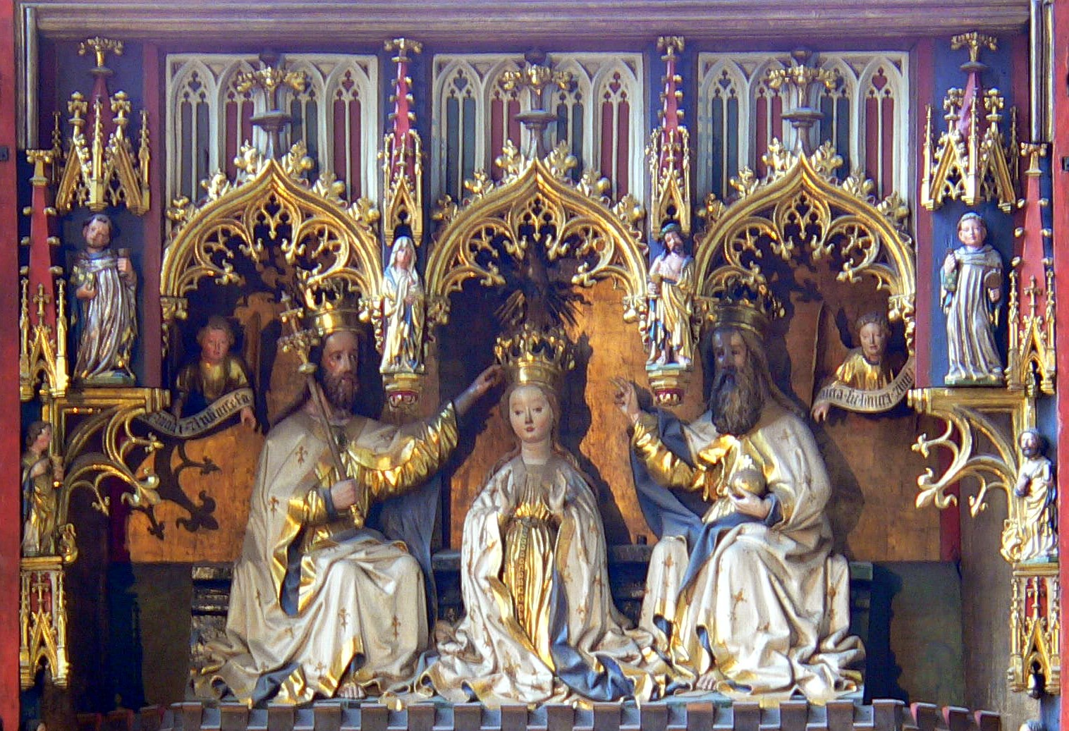 Der Wiener Neustädter Altar im Stephansdom, Wien - Detailaufnahme Schrein oben: "Krönung Mariens durch die Dreifaltigkeit"